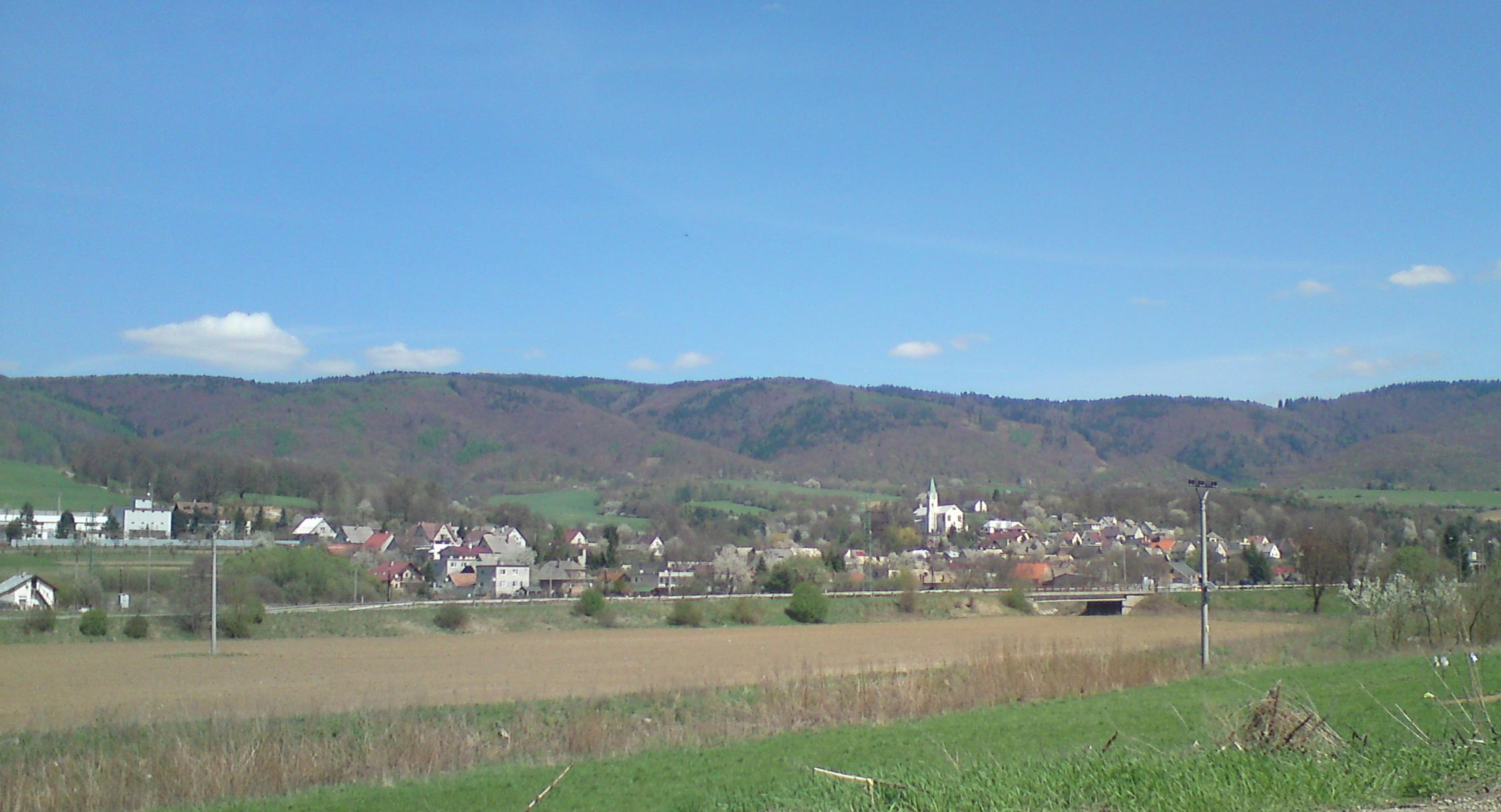 Pohlad na obec z juhu